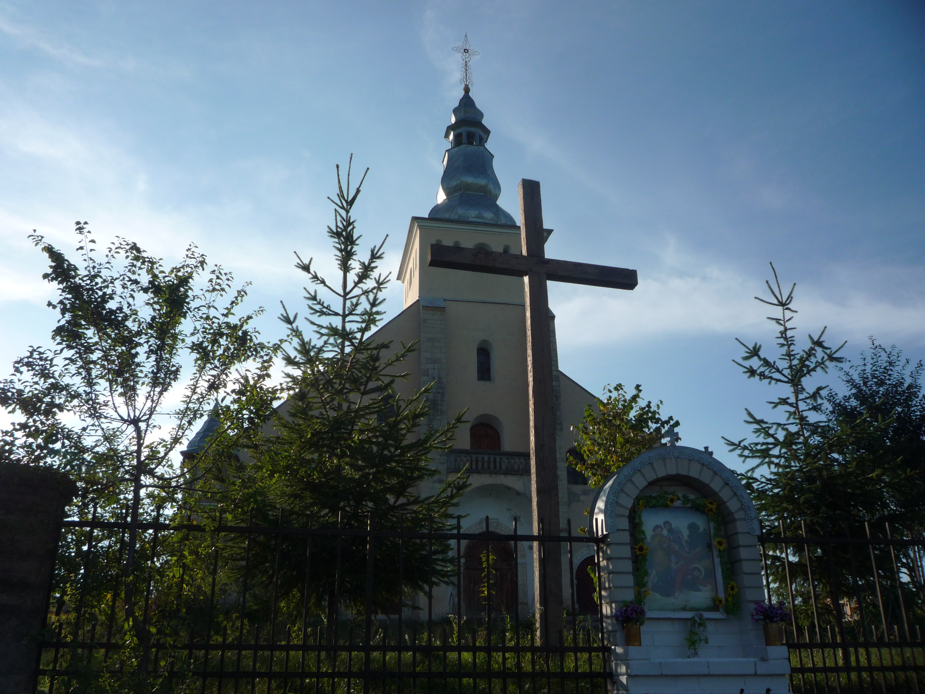 Костел у Старих Петликівцях